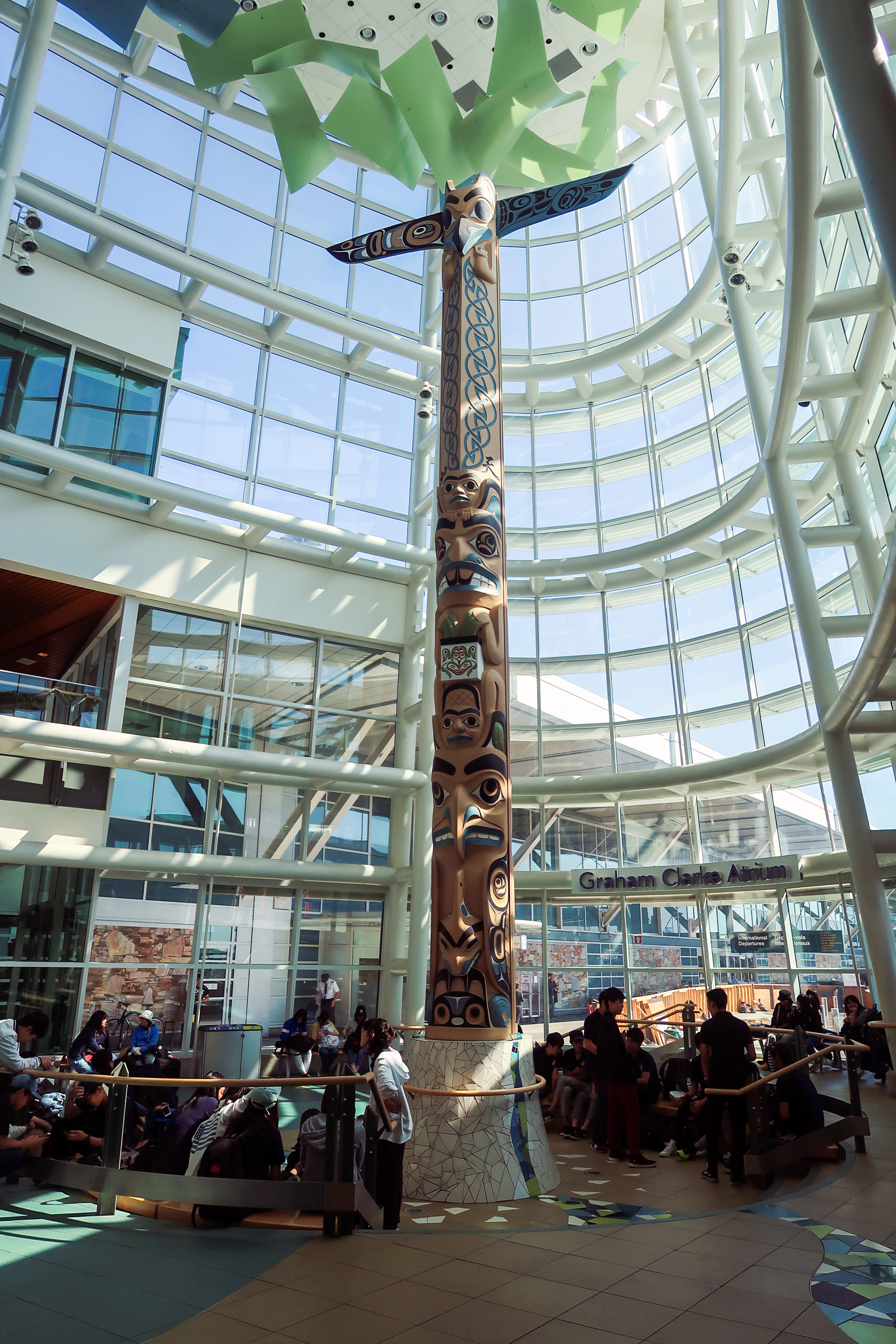 YVR Graham Clarke Atrium